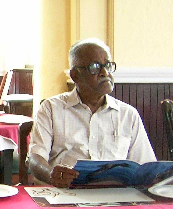 T N A Perumal, Indian photographer